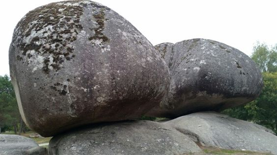 Moles graníticas. froito da erosión, que configuran unha fermosa área natural no concello de Outeiro de Rei ,o que naceu Manuel María.